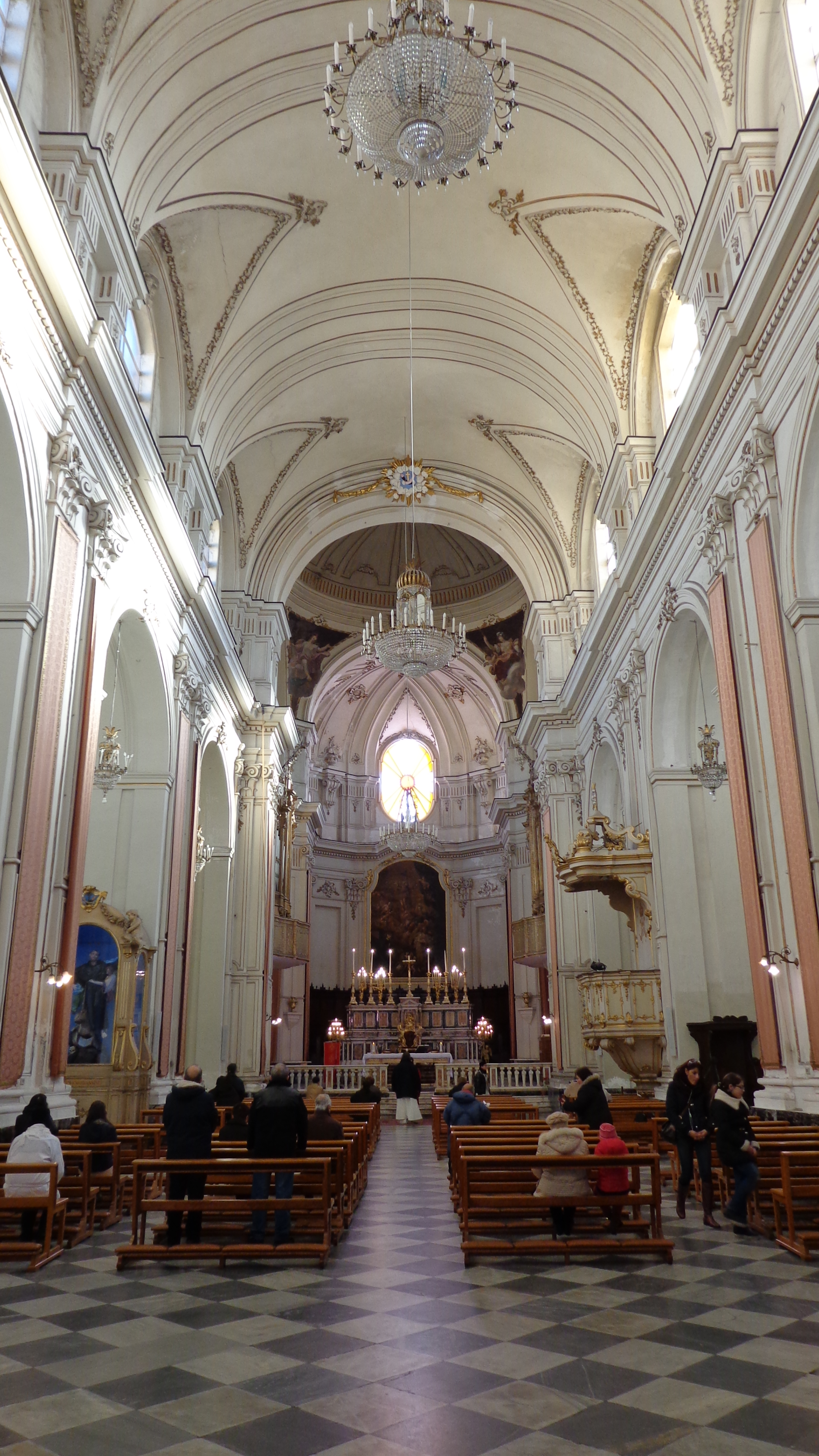 Navata centrale Chiesa di San Francesco d'Assisi all'Immacolata